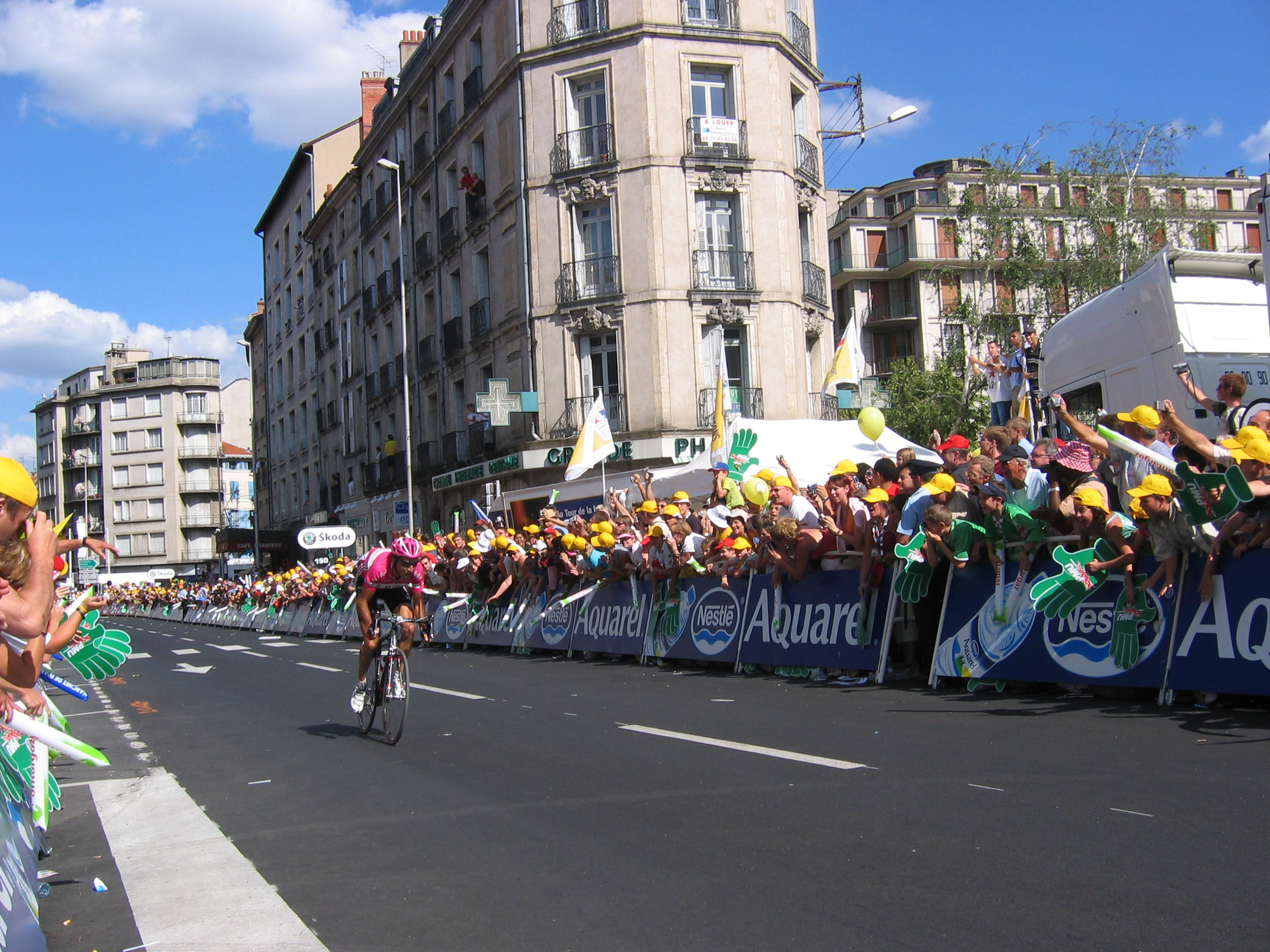 L'italien Giuseppe Guerini (T-Mobile Team) à l'arrivée au Puy du Tour de France 2005. Photo personnelle laissée libre d'utilisation. This is an own picture of Giuseppe Guerini during is victory stage on Le Puy on the 2005 Tour de France